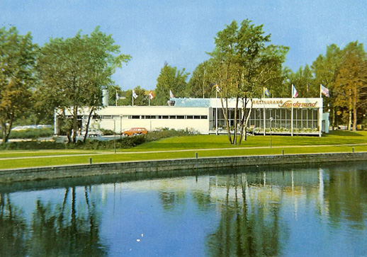 Restaurang Sandgrund. Byggnadsår 1960. Arkitekt Uno Asplund på Wästlunds arkitektkontor